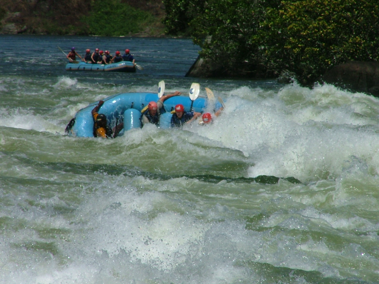 Rafting at Bujagali Falls, Uganda